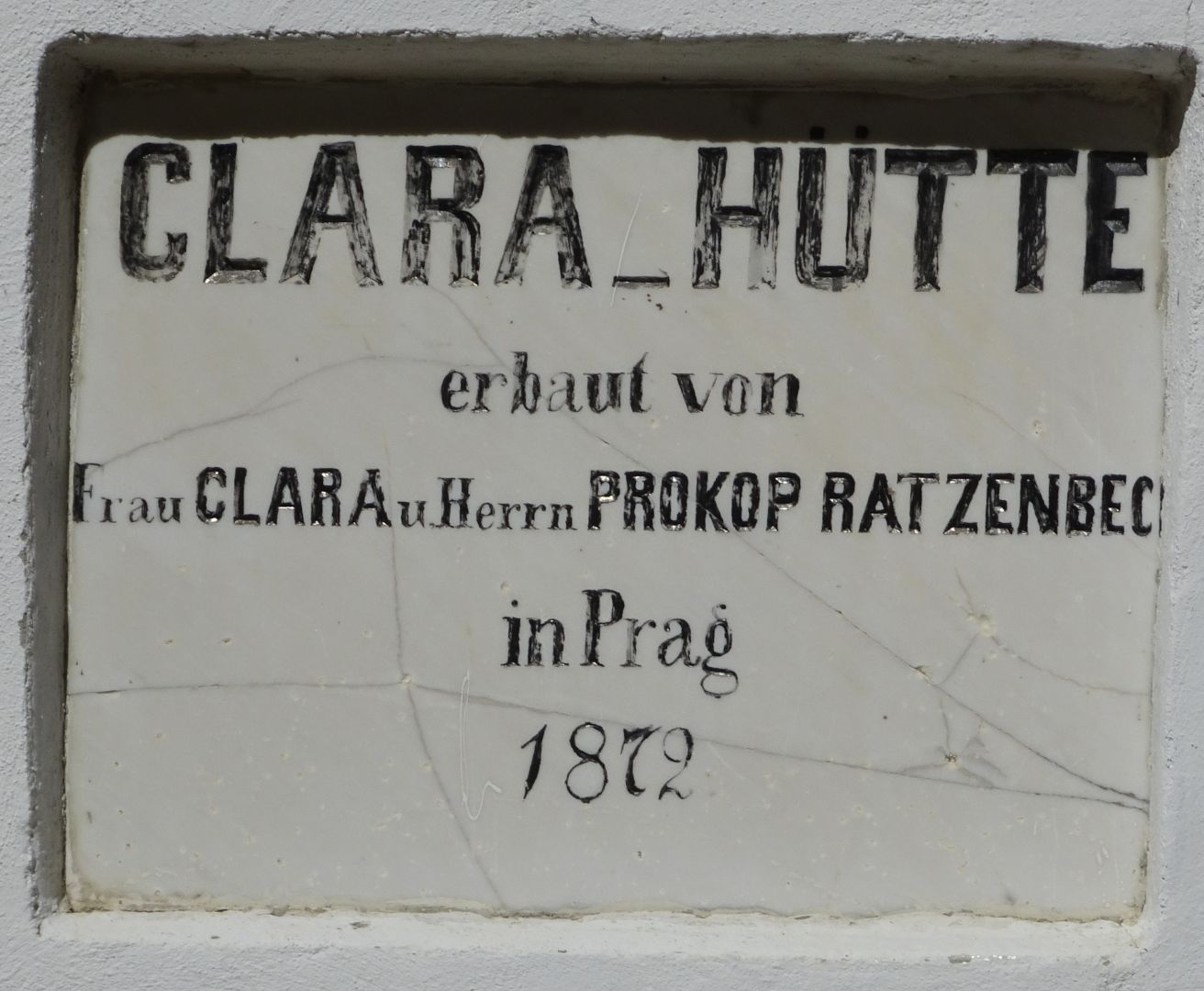 Alte Inschrift an der Clarahütte